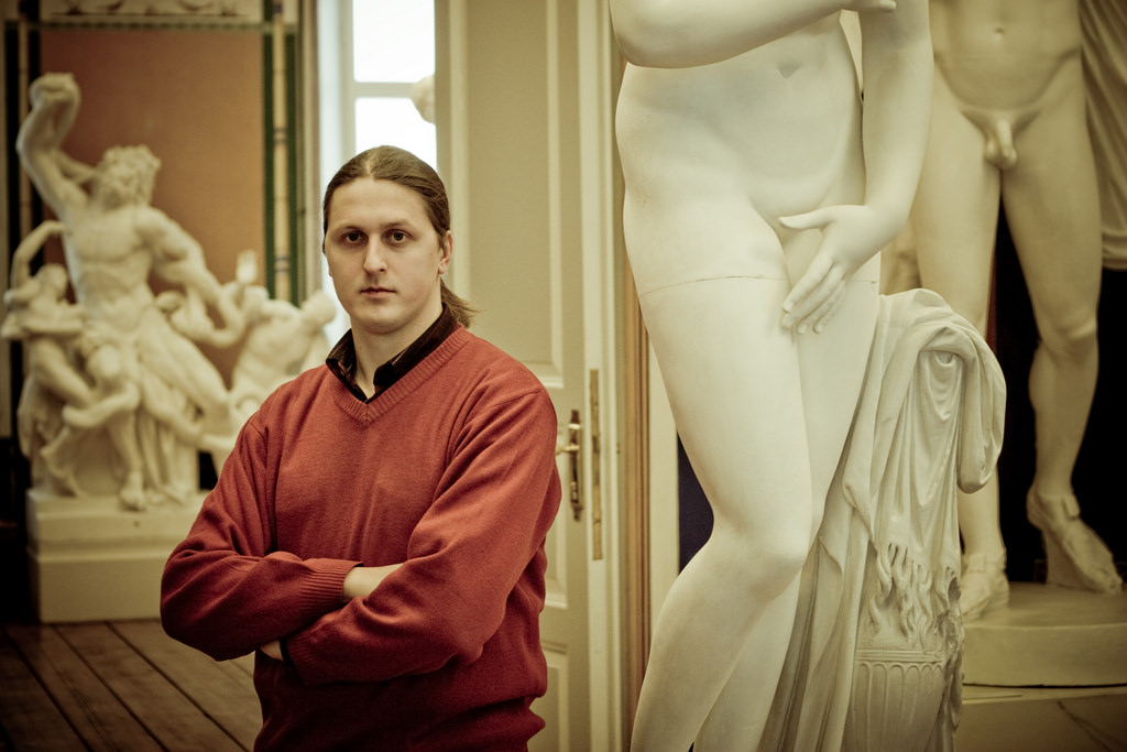 Assürioloog Vladimir Sazonov 2010. aastal Tartus, TÜ Kunstimuuseumis.